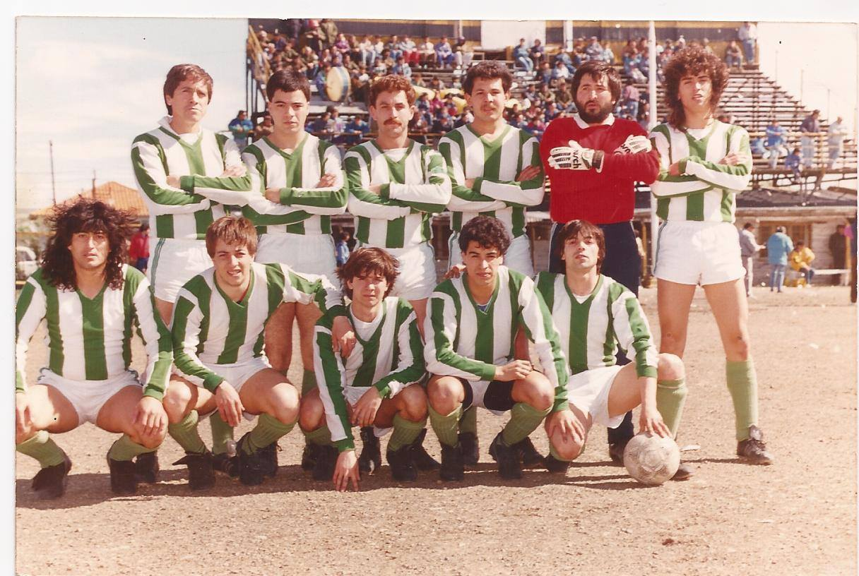 Estadio de Ferro YCF